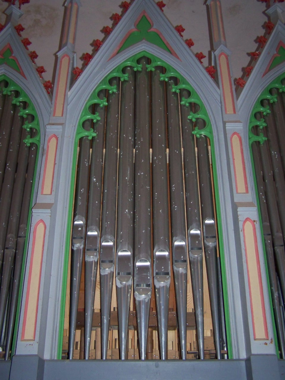 Niepars, Dorfkirche, Mehmel-Orgel Pfeifen (2008-09-14)